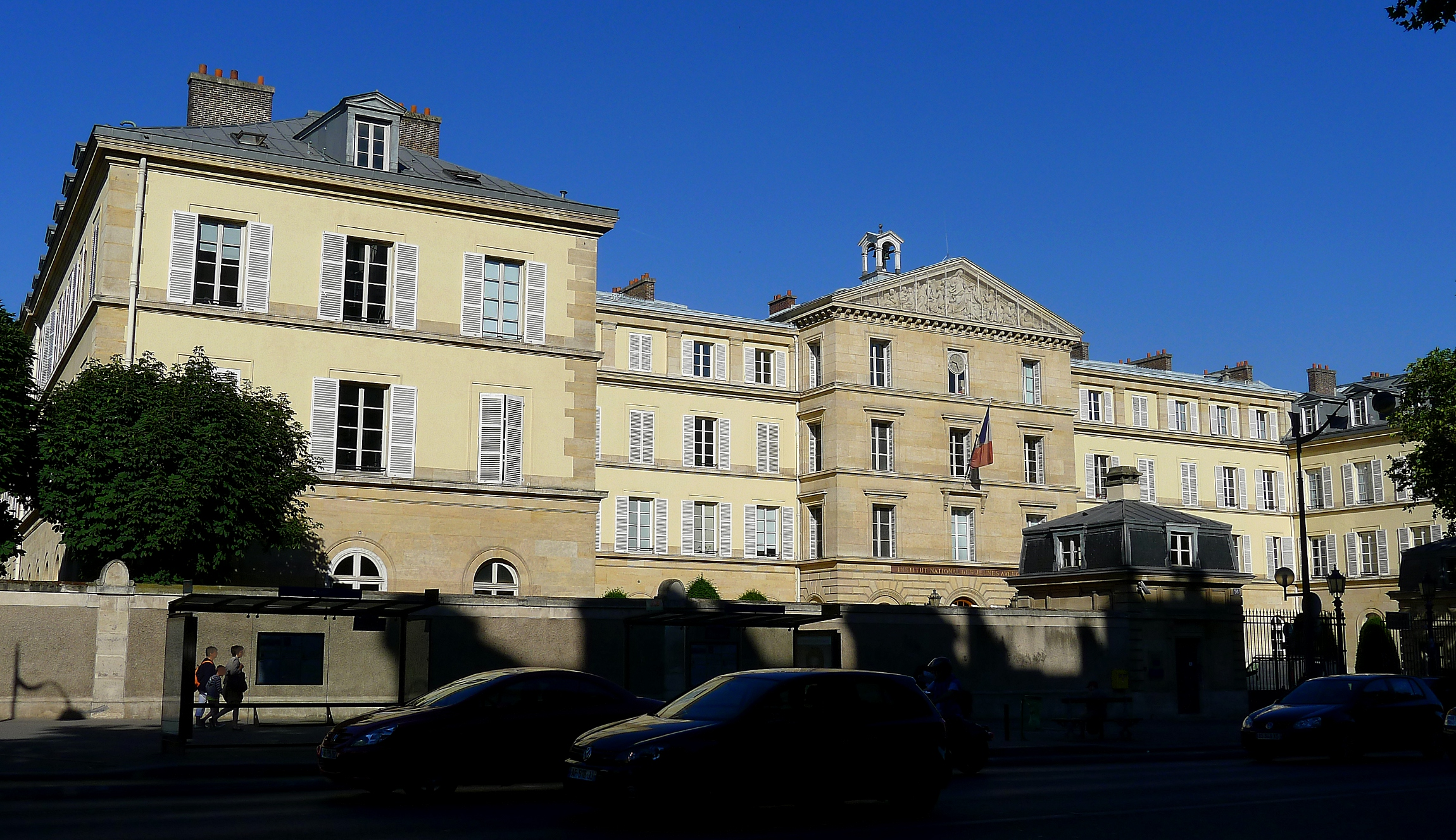 Institut national des jeunes aveugles au n°56 du boulevard des Invalides - Paris VII .